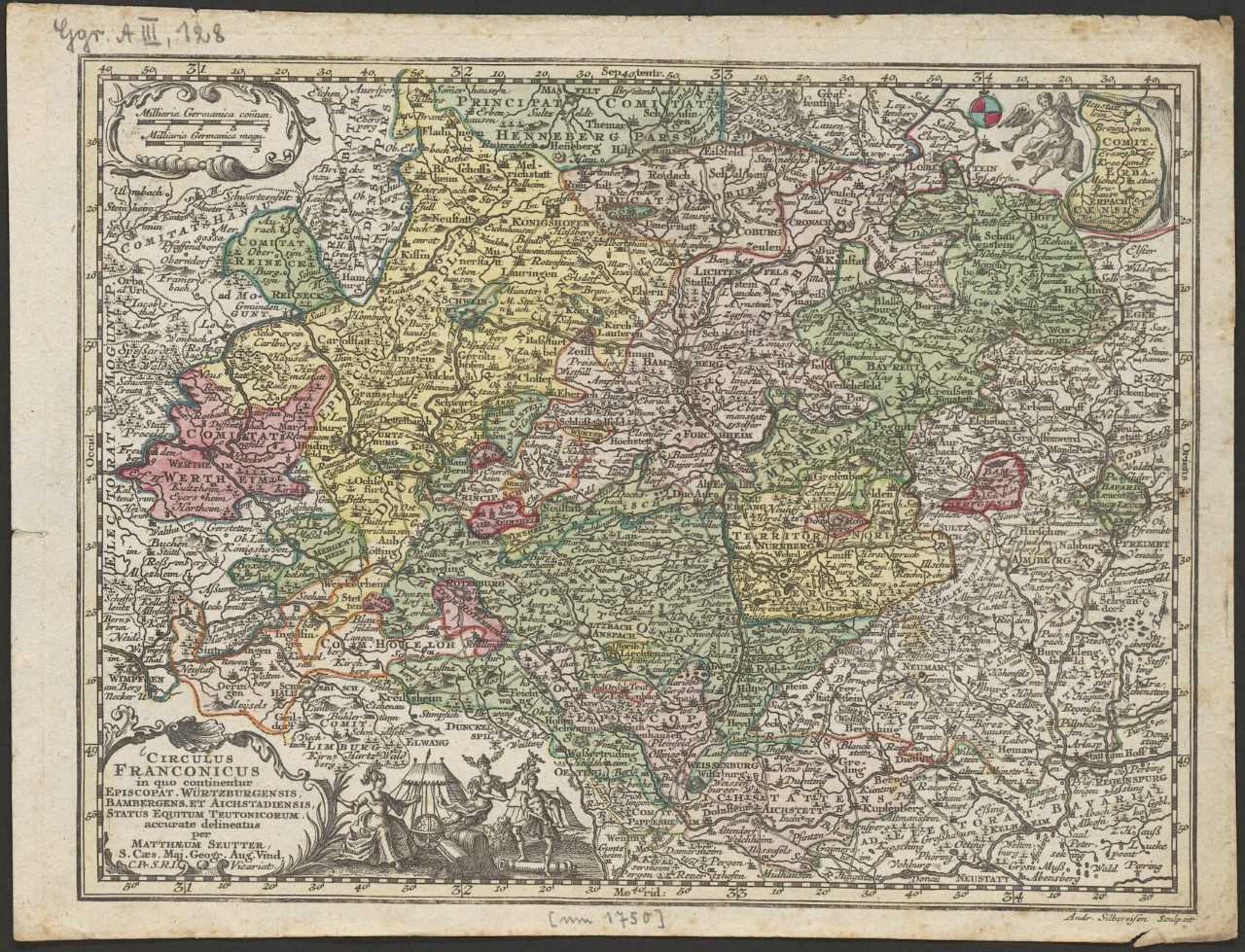 UB Erlangen-Nürnberg, Ggr. A III, 128: Fränkischer Reichskreis, 1740/72 („Circulus Franconicus in quo sunt Episcopatus Wurtzburgensis, Bambergensis et Aichstetensis, Status Equitum Teutonicorum […] et Territorium Norinbergense […] per F[rederik] de W[it], ca. 1682), Nachdruck als Kupferstich bei Matthäus Seutter, 1740/42.